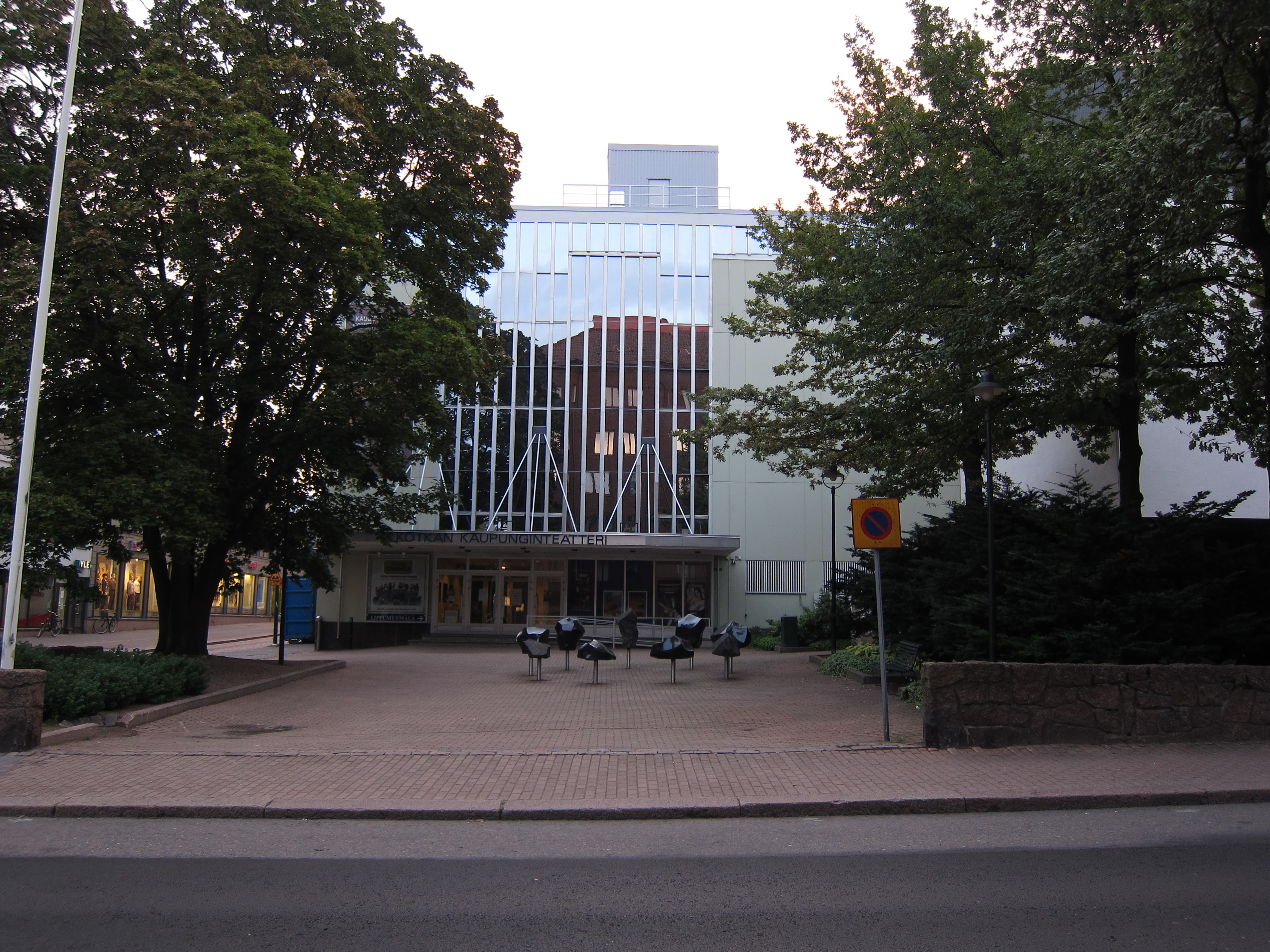 Kotkan kaupunginteatteri.